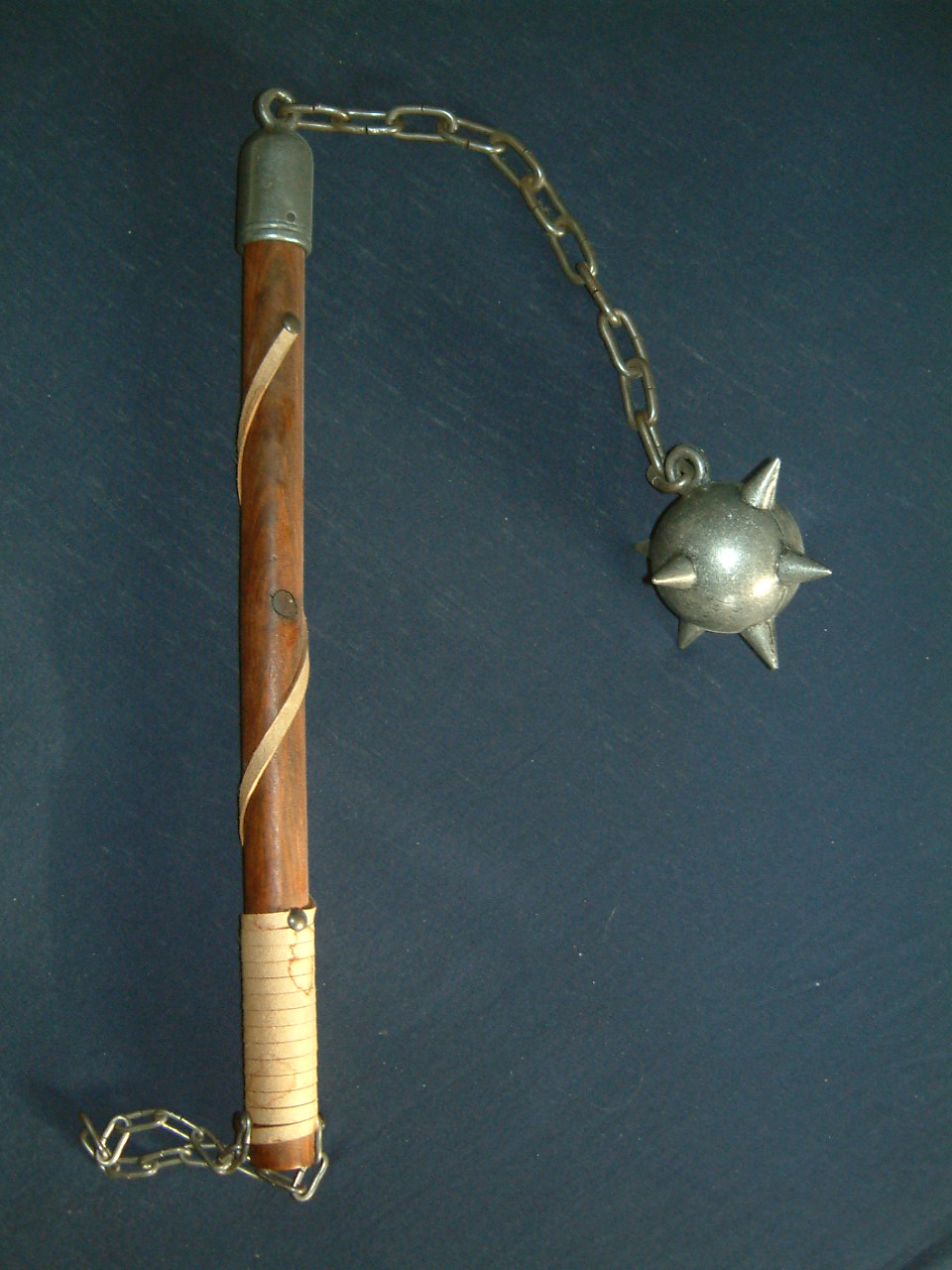 Ein mit einem Lederriemen verzierter klassischer Flegel mit kugelförmigem Kopf und Kette als Faustriemen